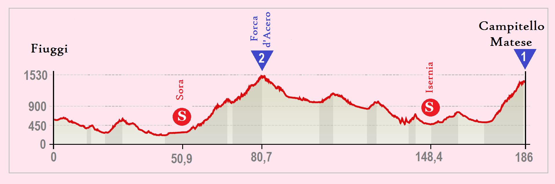 Perfil de la 8.ª etapa del Giro de Italia 2015